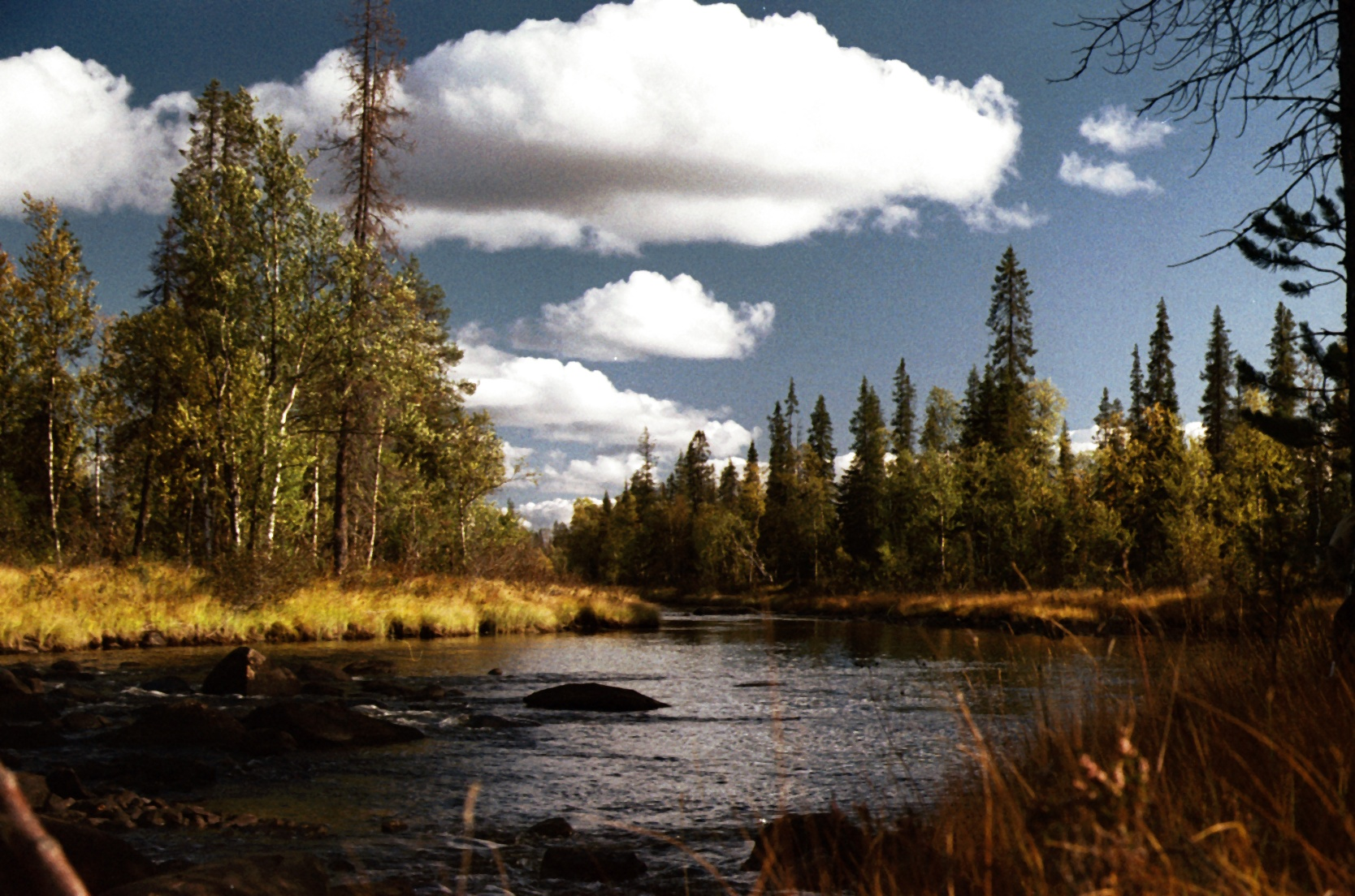 Река Кана, осень 1991